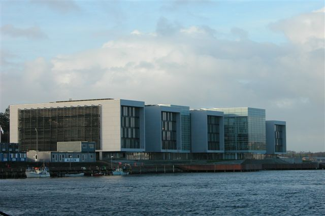 Alsion der bl.a. huser Sønderjyllands Symfoniorkester og Syddansk Universitet